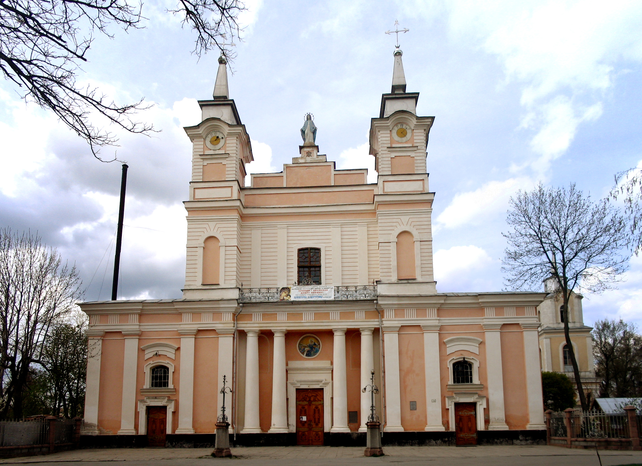 Кафедральний костел Св. Софії, пам'ятка архітектури 1737-1751 рр.